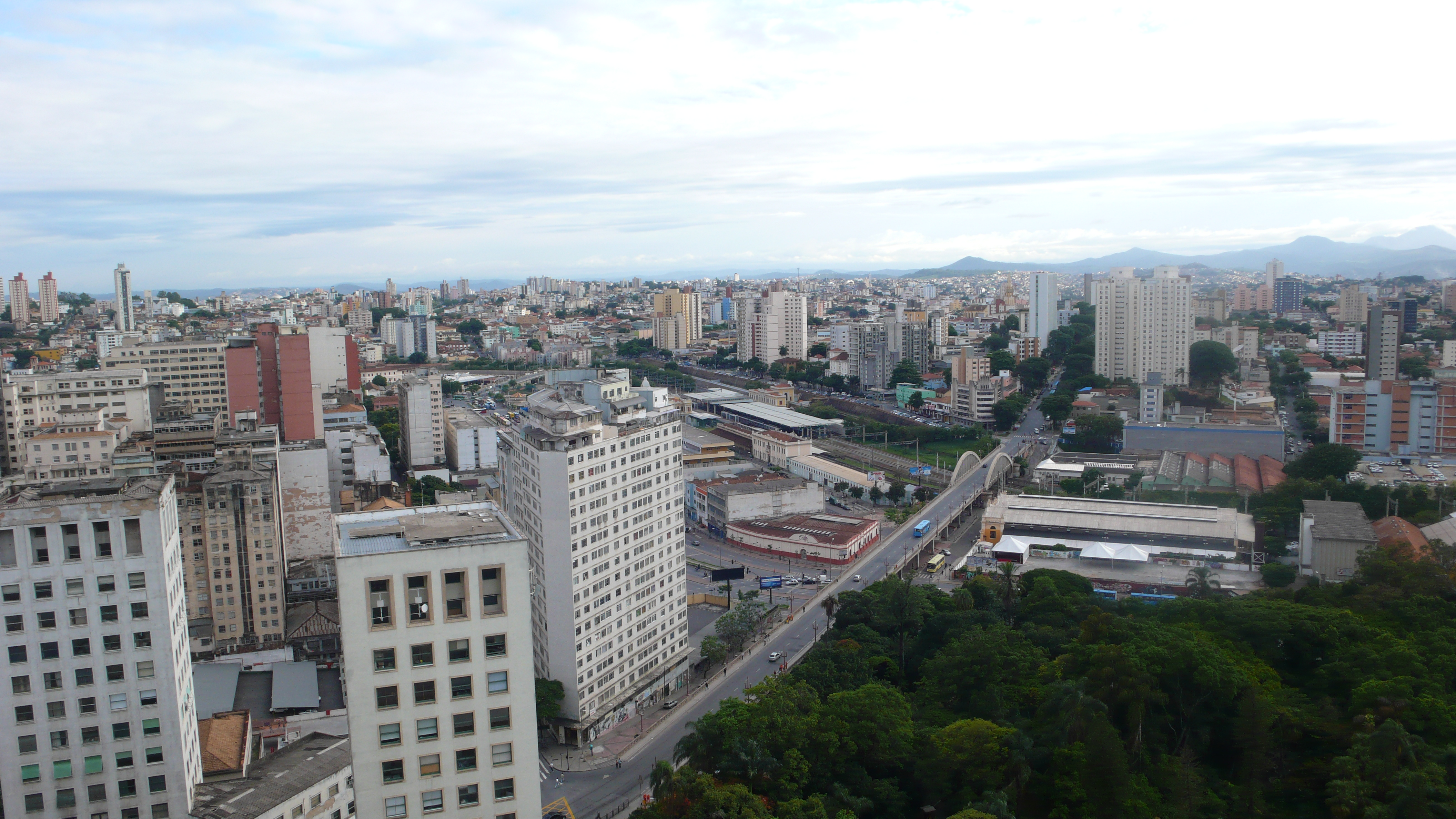 Viaduto Santa Tereza, Belo Horizonte, Minas Gerais, Brasil